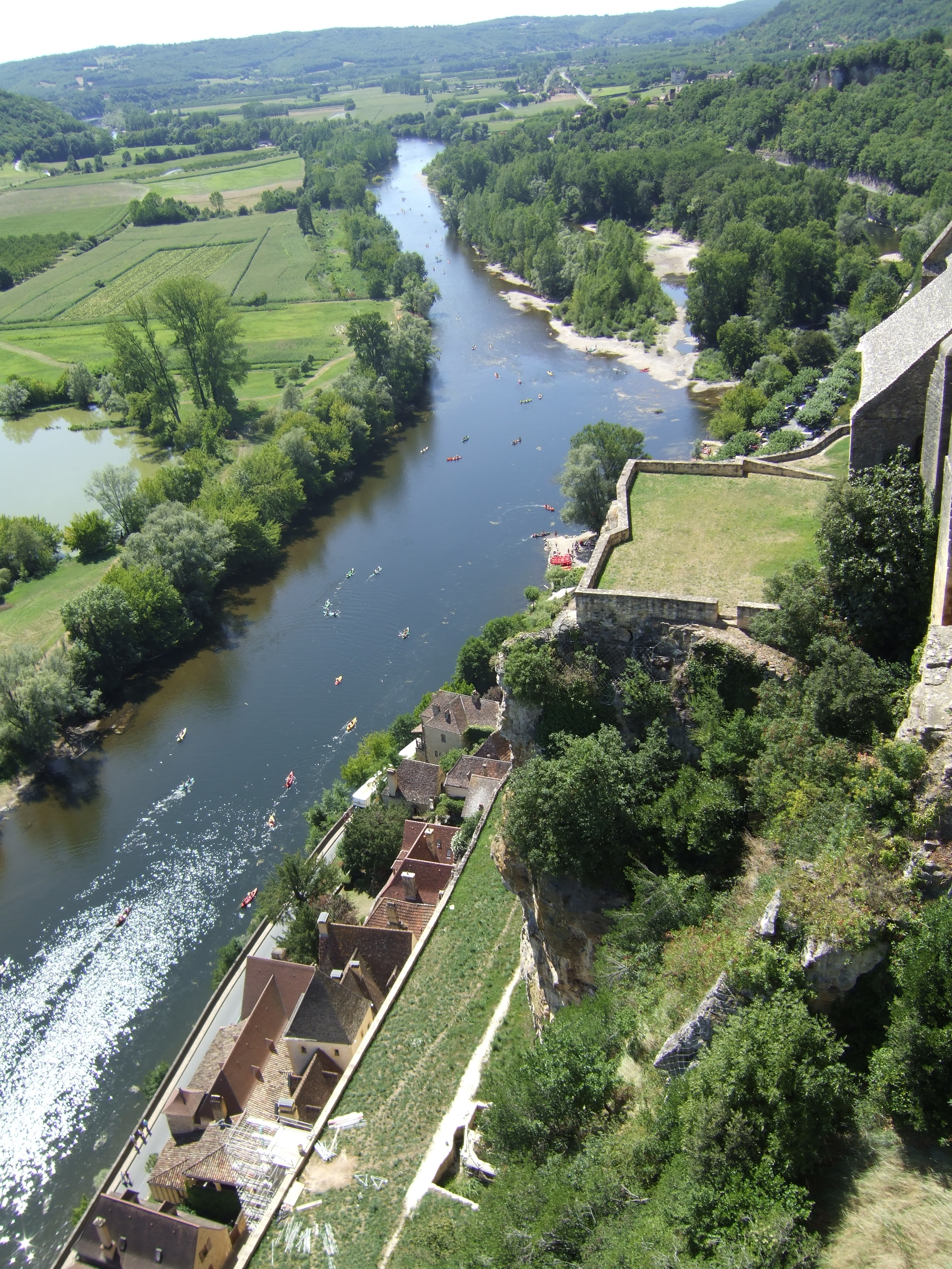 Dordogne river at Beynac-et-Cazenac